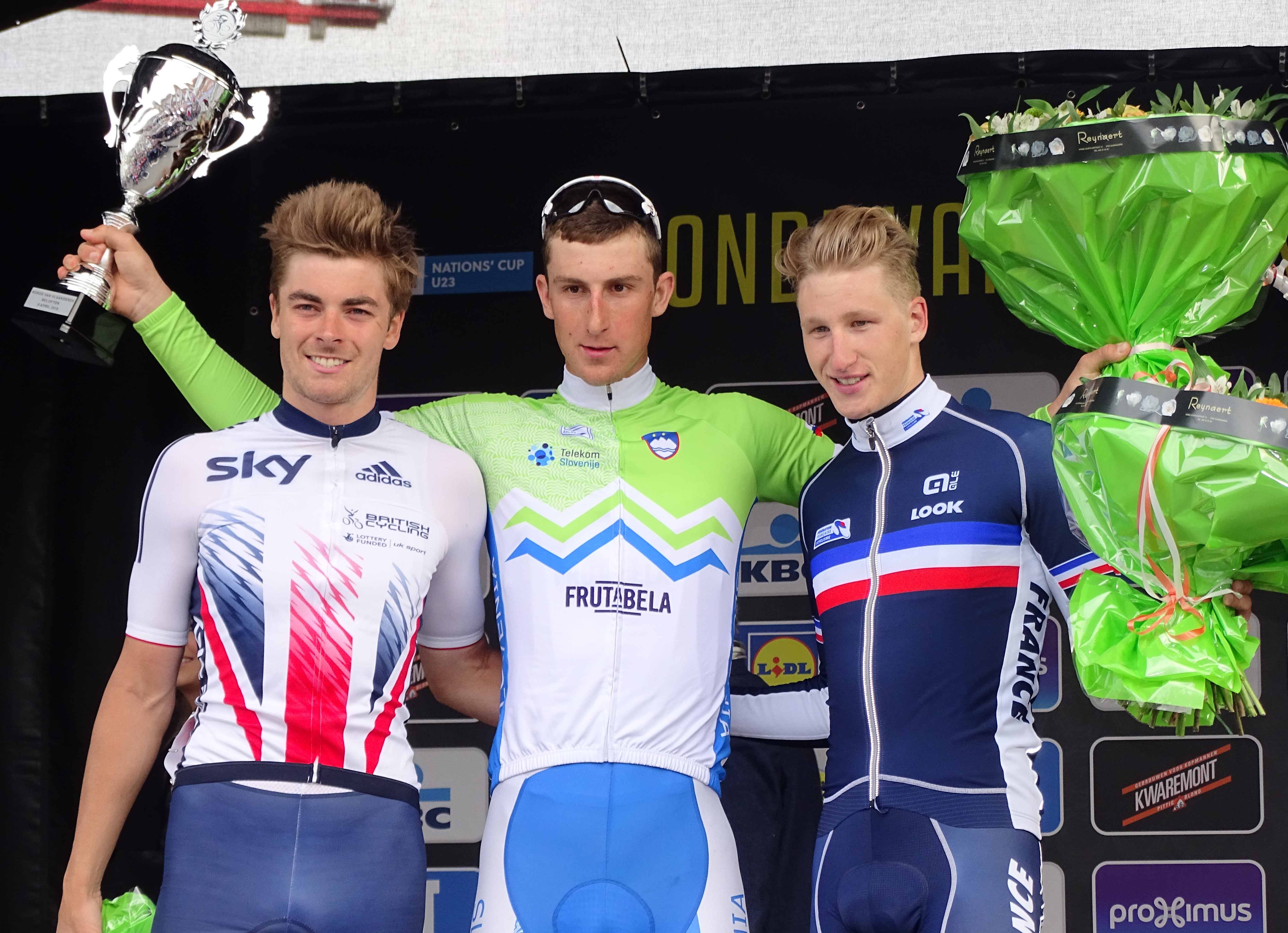 Reportage réalisé le samedi 9 avril à l'occasion du départ et de l'arrivée du Tour des Flandres espoirs 2016 à Audenarde, Belgique.